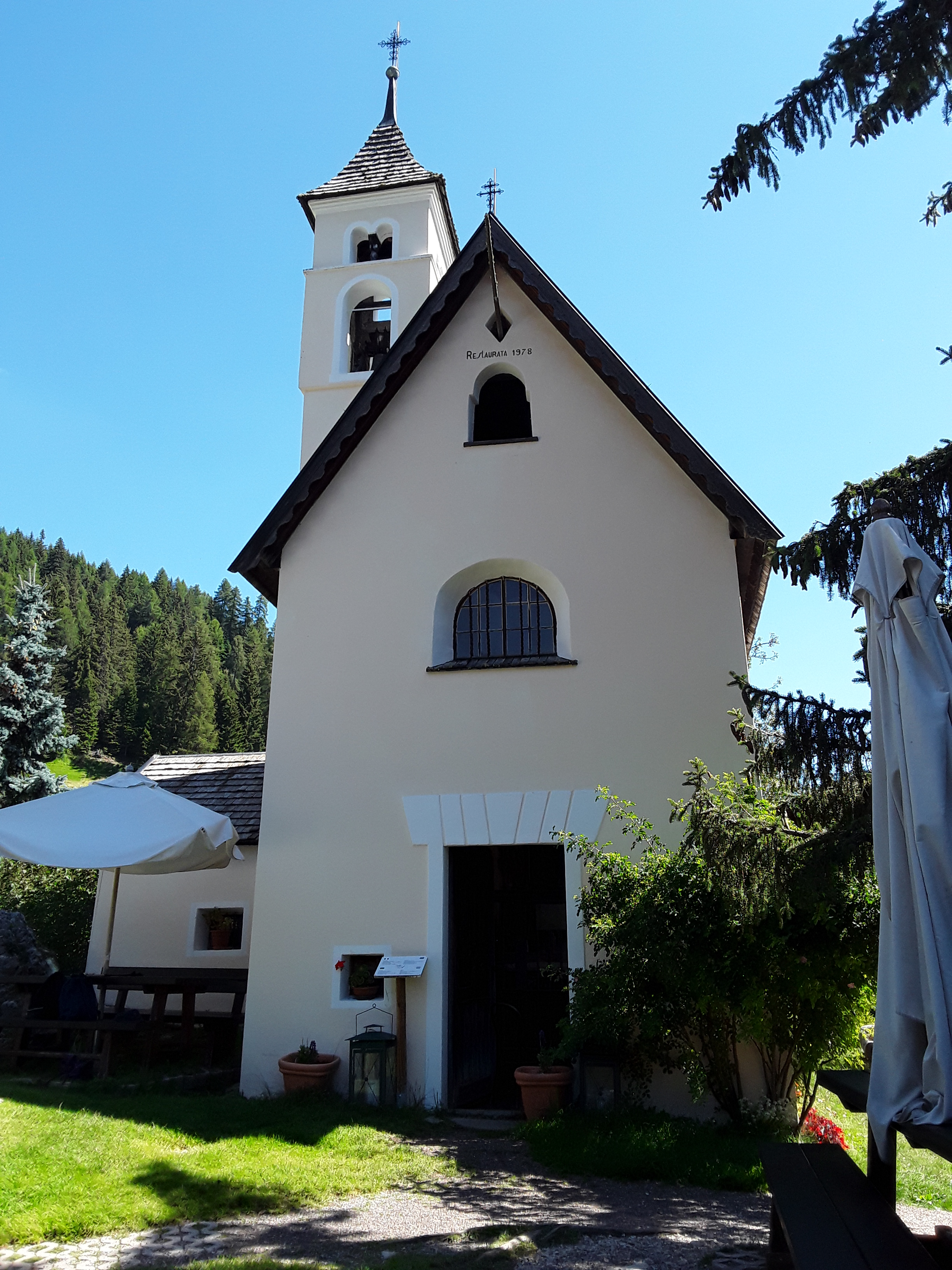 Penìa (Moena)